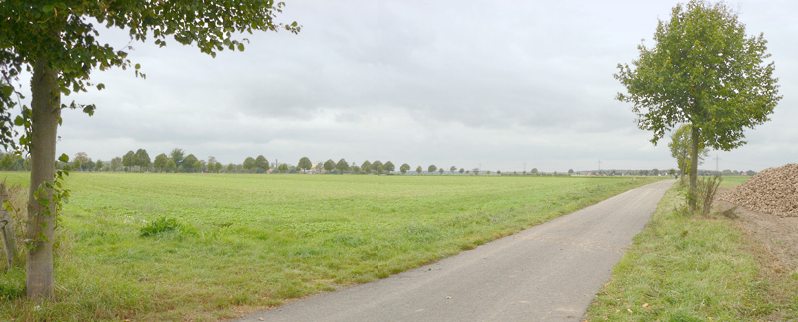 Schlachtfeld der Schlacht bei Sievershausen, Ortsausgang Sievershausen Richtung Arpke